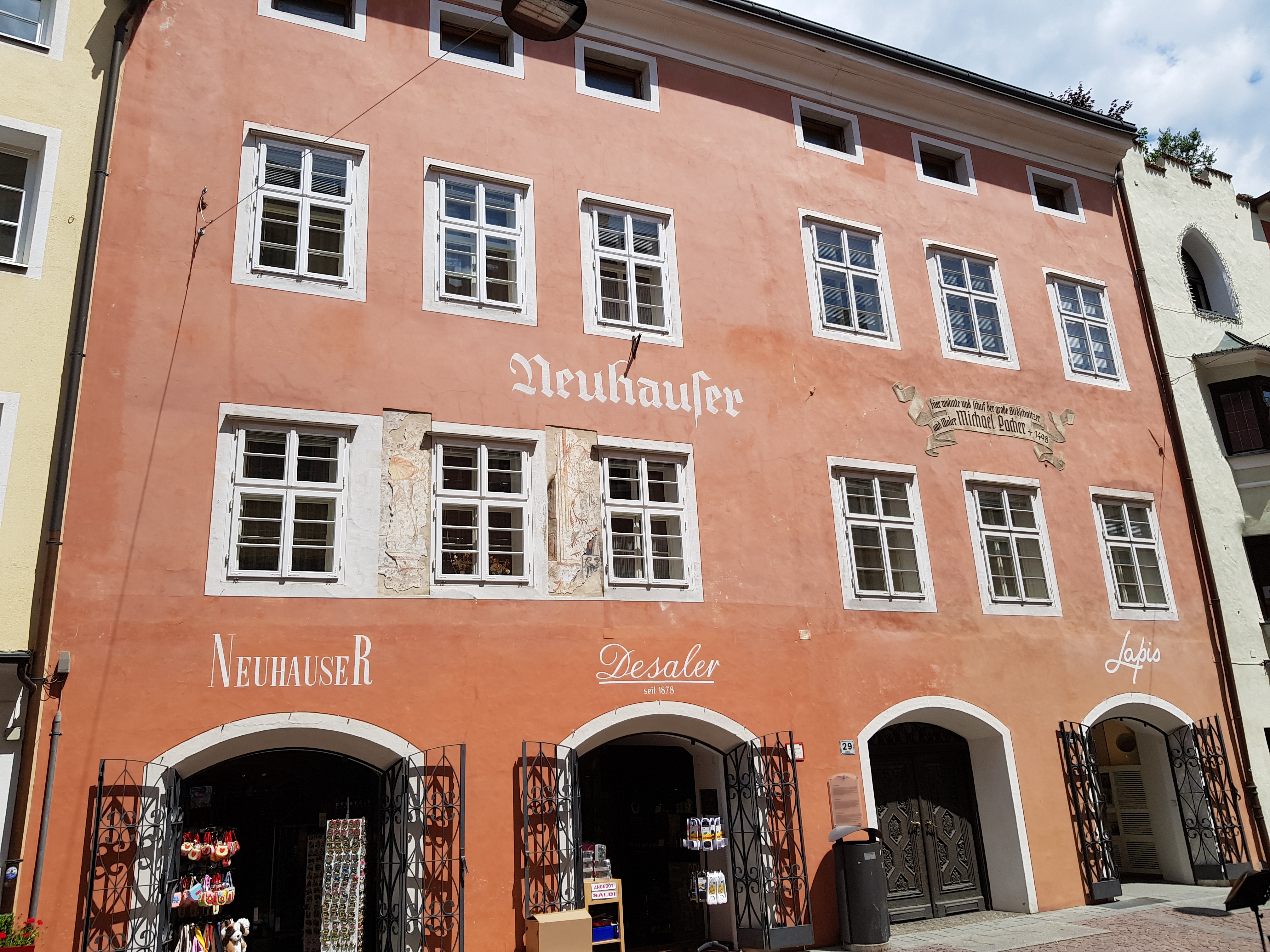 Haus Neuhauser, Stadtgasse 29, Bruneck, Südtirol